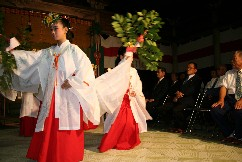 巫女による浦安の舞